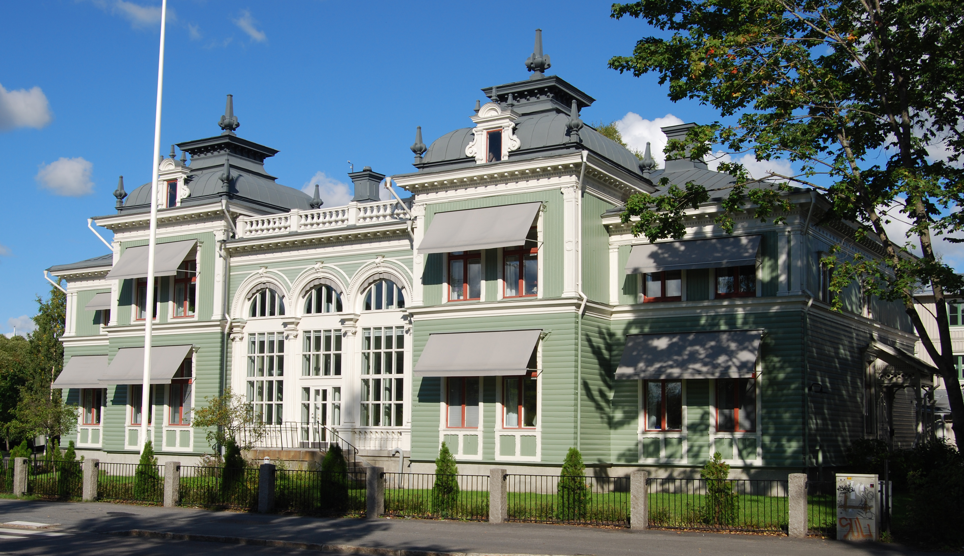 Moritzska gården i Umeå